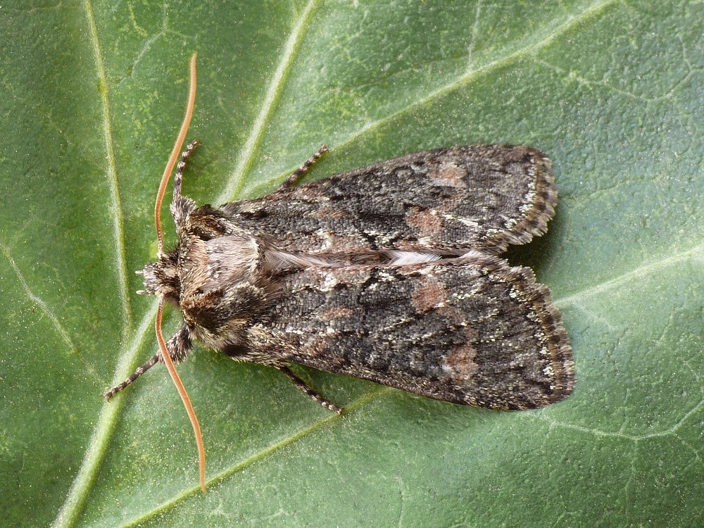 1=Polyploca ridens - Slovakia, Trenčín - Chocholná-Velčice